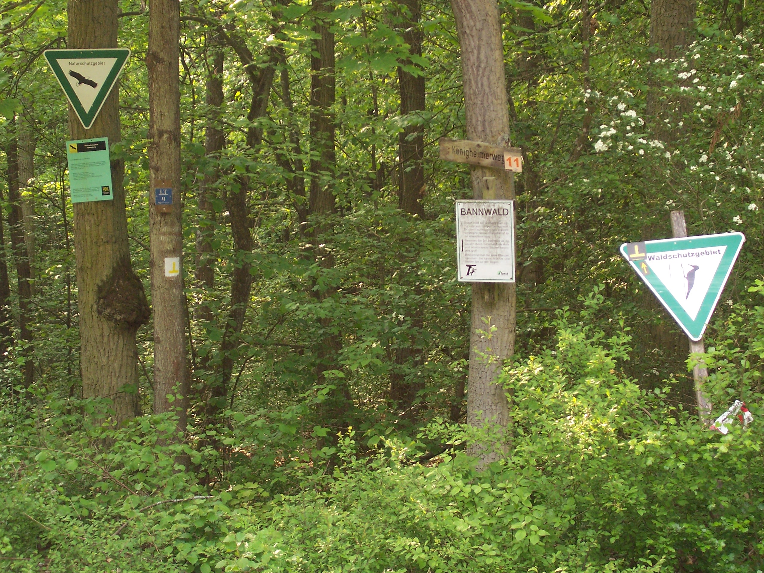 Naturschutzgebiet Stammberg (Tauberbischofsheim, Baden-Württemberg, NSG Nr. 1.223), Bannwald; Schilder Naturschutzgebiet, Bannwald und Waldschutzgebiet